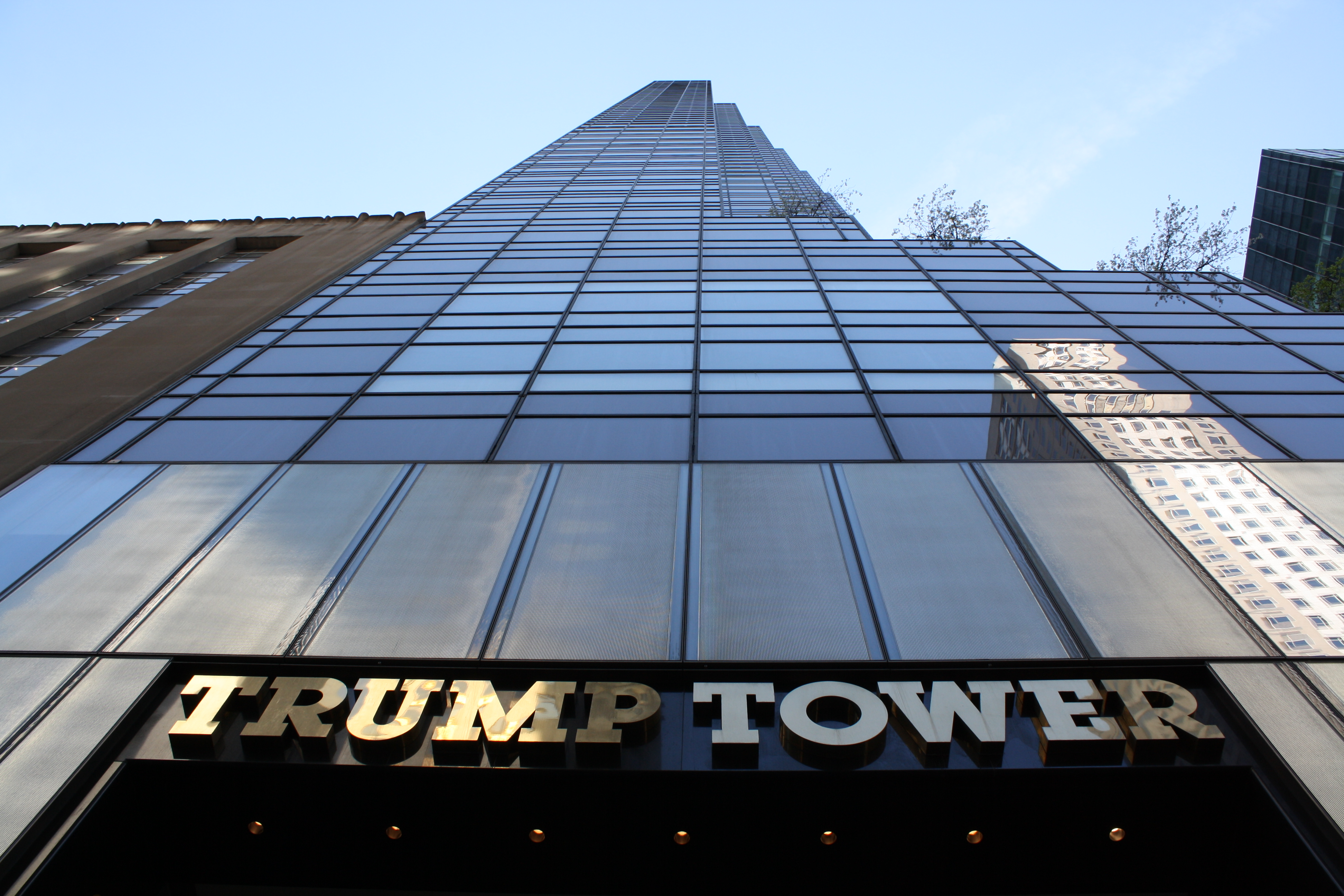 New York City; 2009